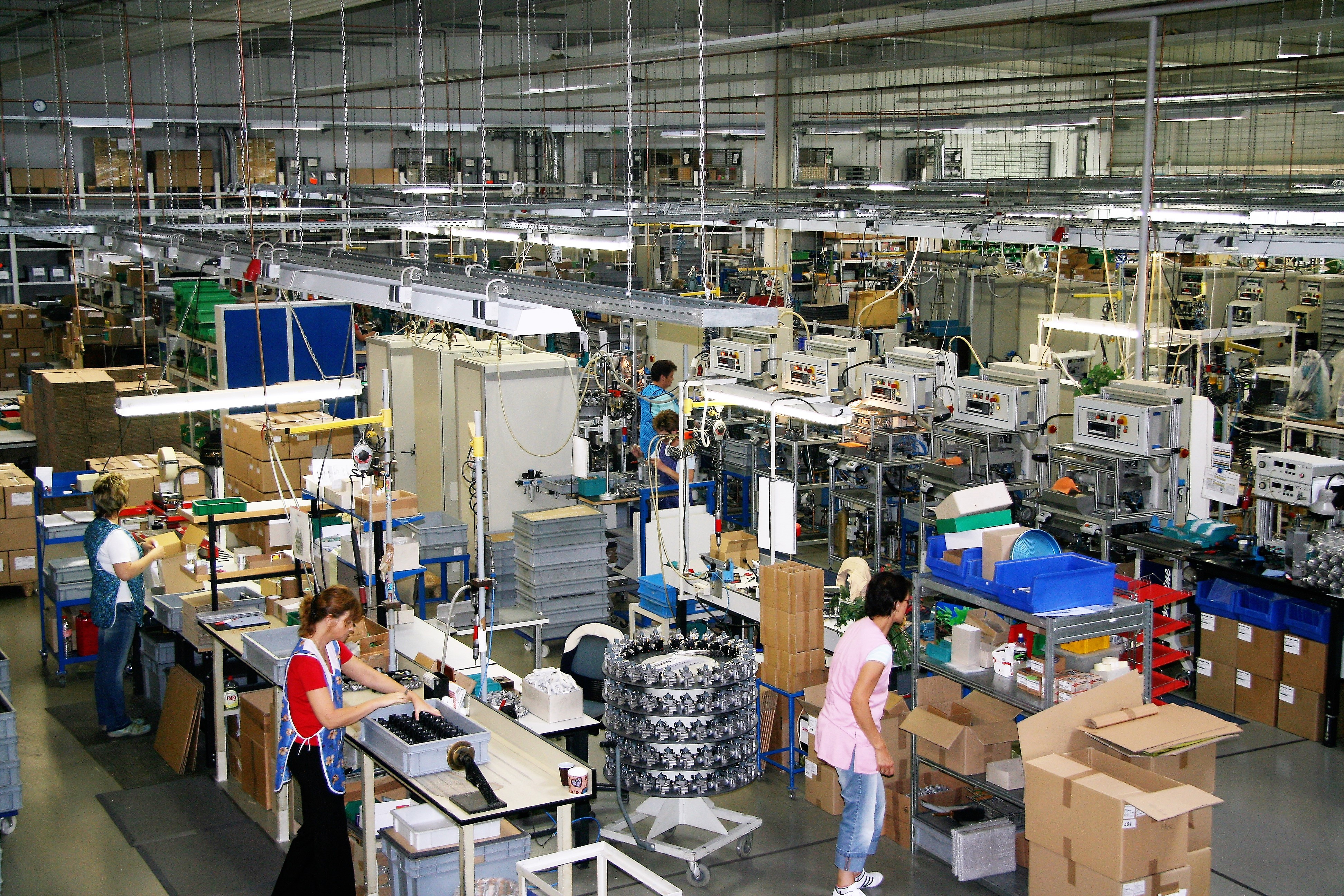 Mertik Maxitrol Thale Montagebereich